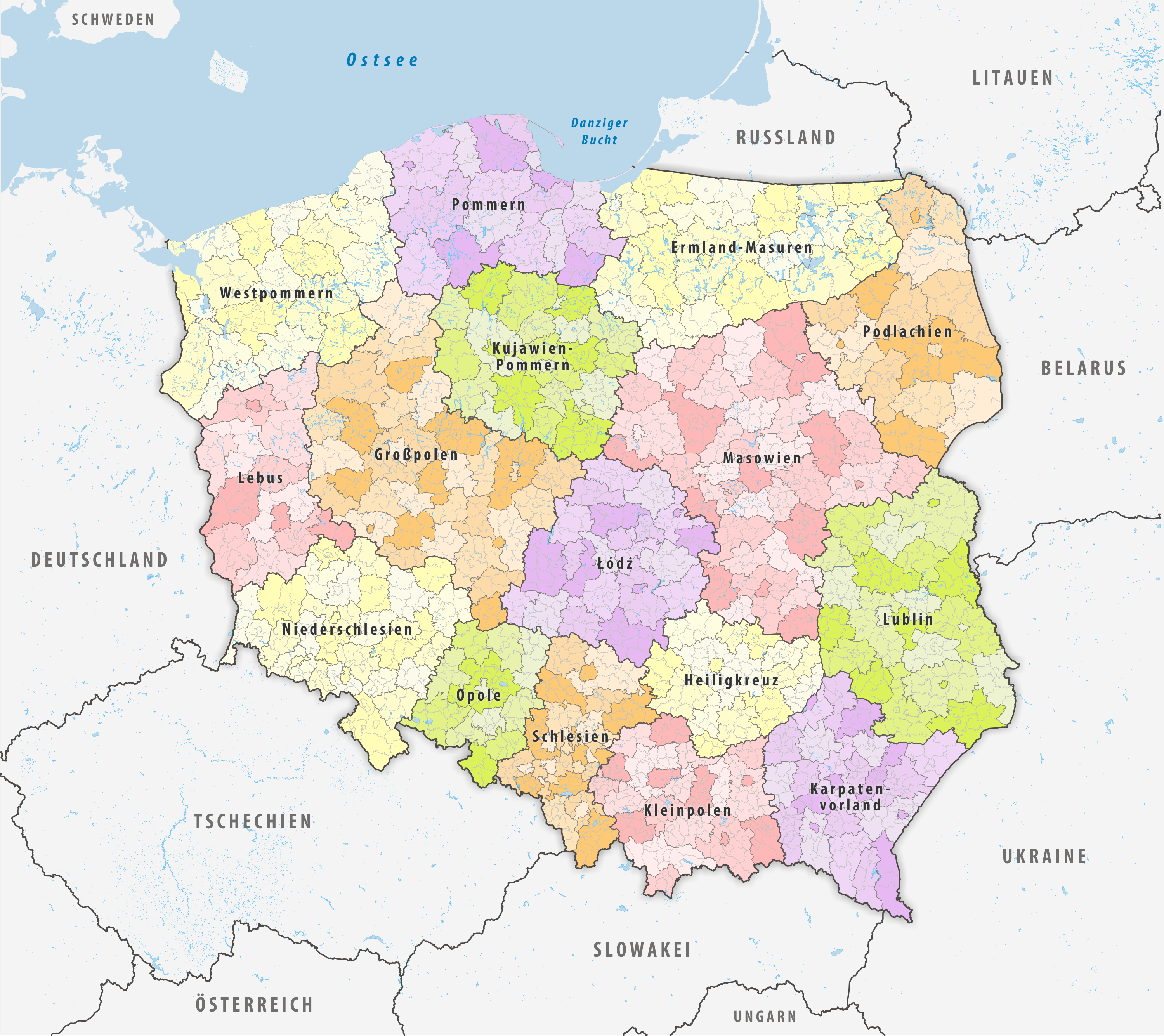 Die Verwaltungsgliederung Polens